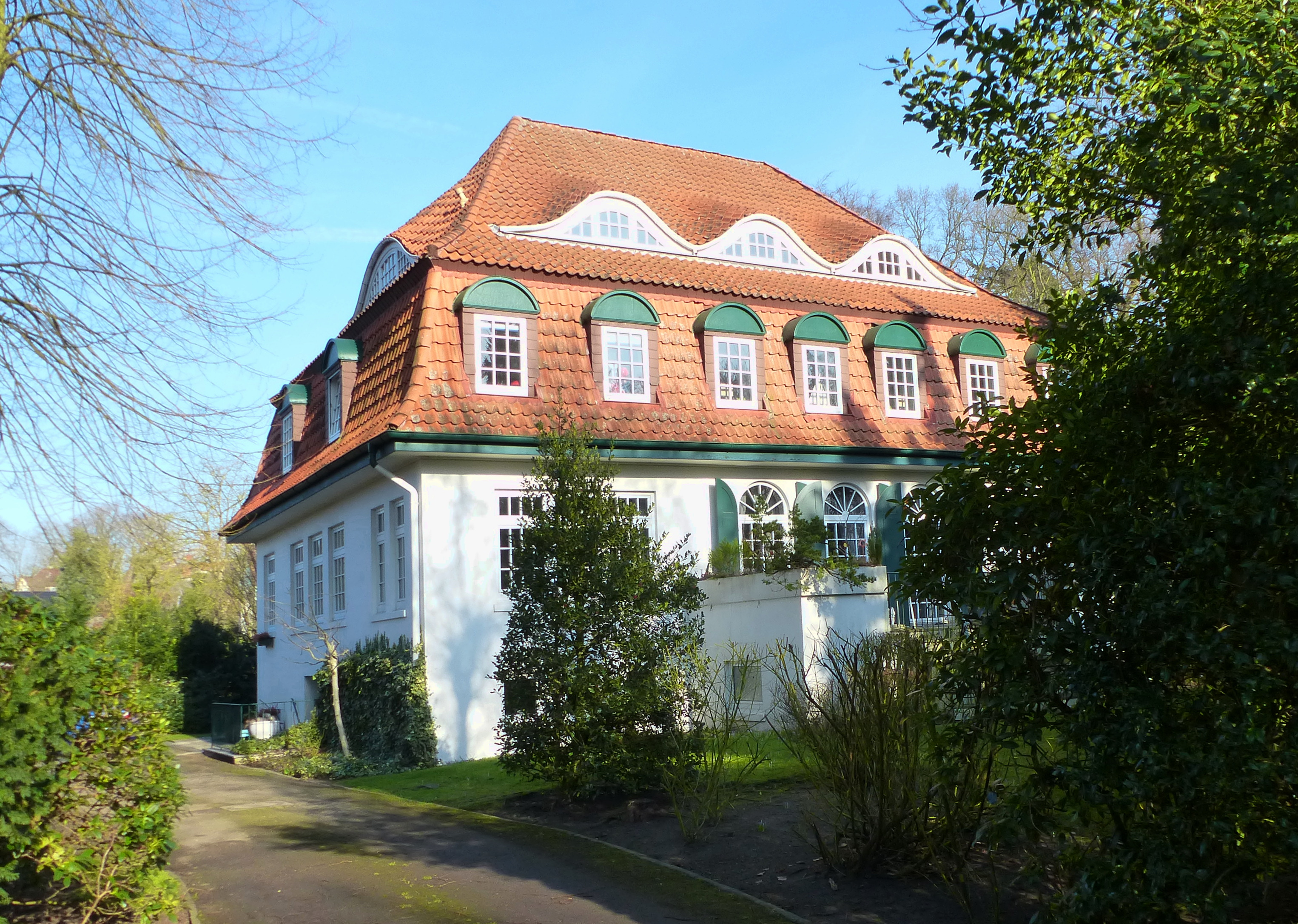 Villa Trost in Bremen, Lesmonastraße 3Das abgebildete Objekt ist ein geschütztes Kulturdenkmal in der Freien Hansestadt Bremen, mit der Nr. 1294 beim Landesamt für Denkmalpflege registriert.